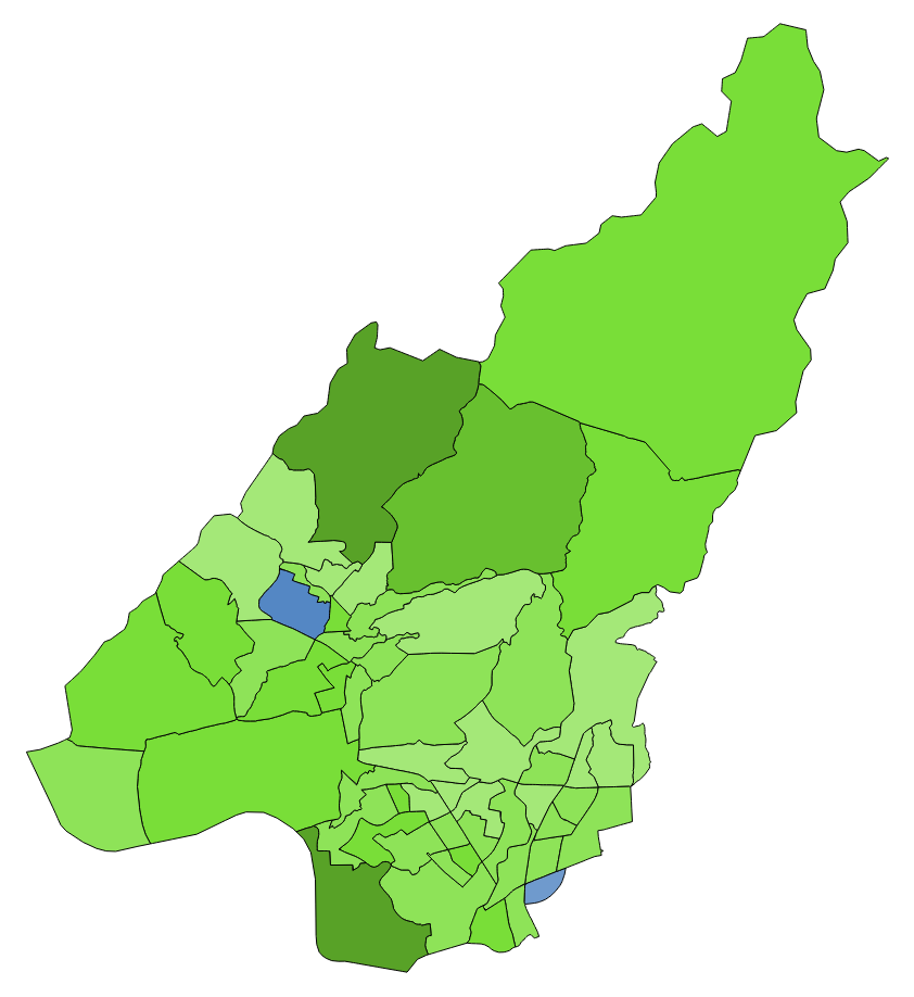 顏色對照表